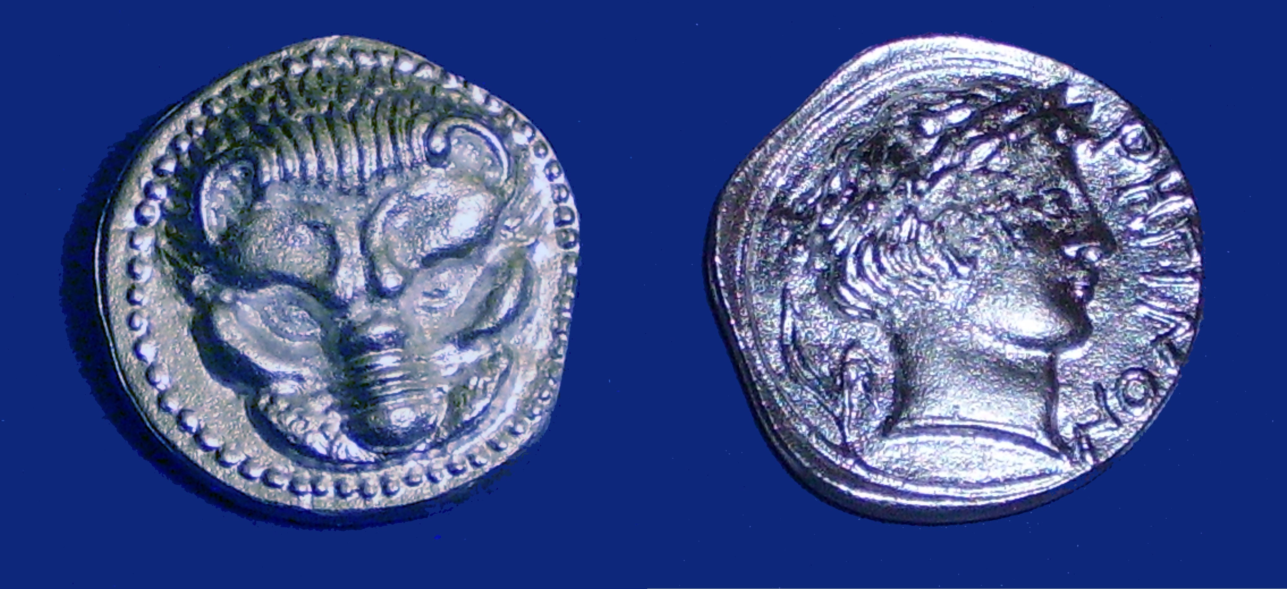 Autore Pigr8, foto scattata ed elaborata da lui quale proprietario del pezzo. Riproduzione di un tetradramma (moneta d'argento del peso tra i 16,4 e i 17,5 g) della città di Reggio Calabria, di epoca magnogreca intorno al 400 a.C. Alta risoluzione